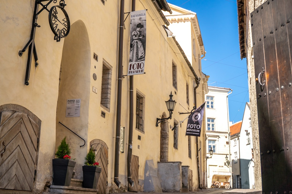 Fotomuuseum